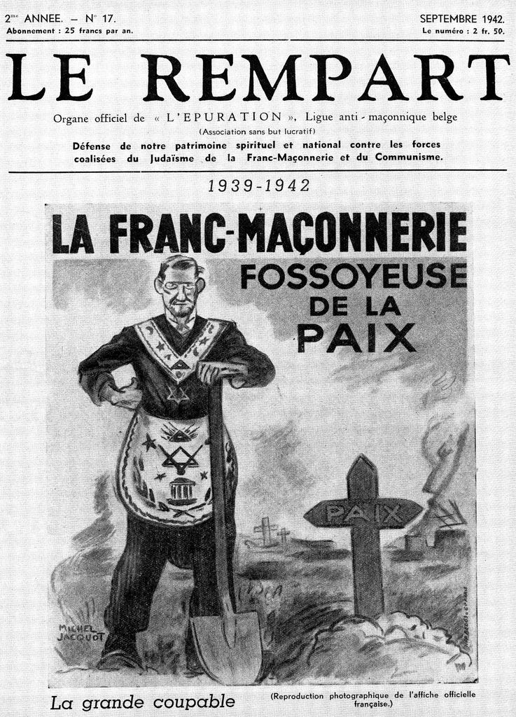 Une du périodique Le Rempart de la Ligue antimaçonnique belge, publiée en septembre 1942.